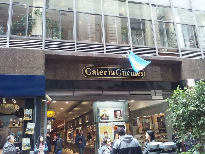 Galería General Güemes vista desde el exterior